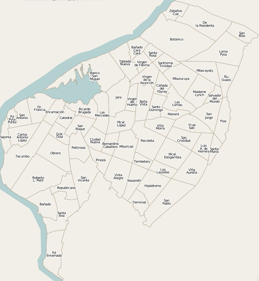 Mapa de barrios en Asunción